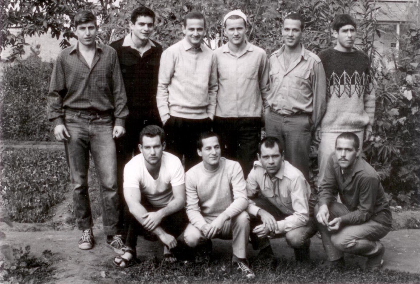 עשרת שבויי צה"ל במלחמת ששת הימים בקהיר. צילום של הצלב האדום בימי השבי האחרונים 31 בדצמבר 1967.